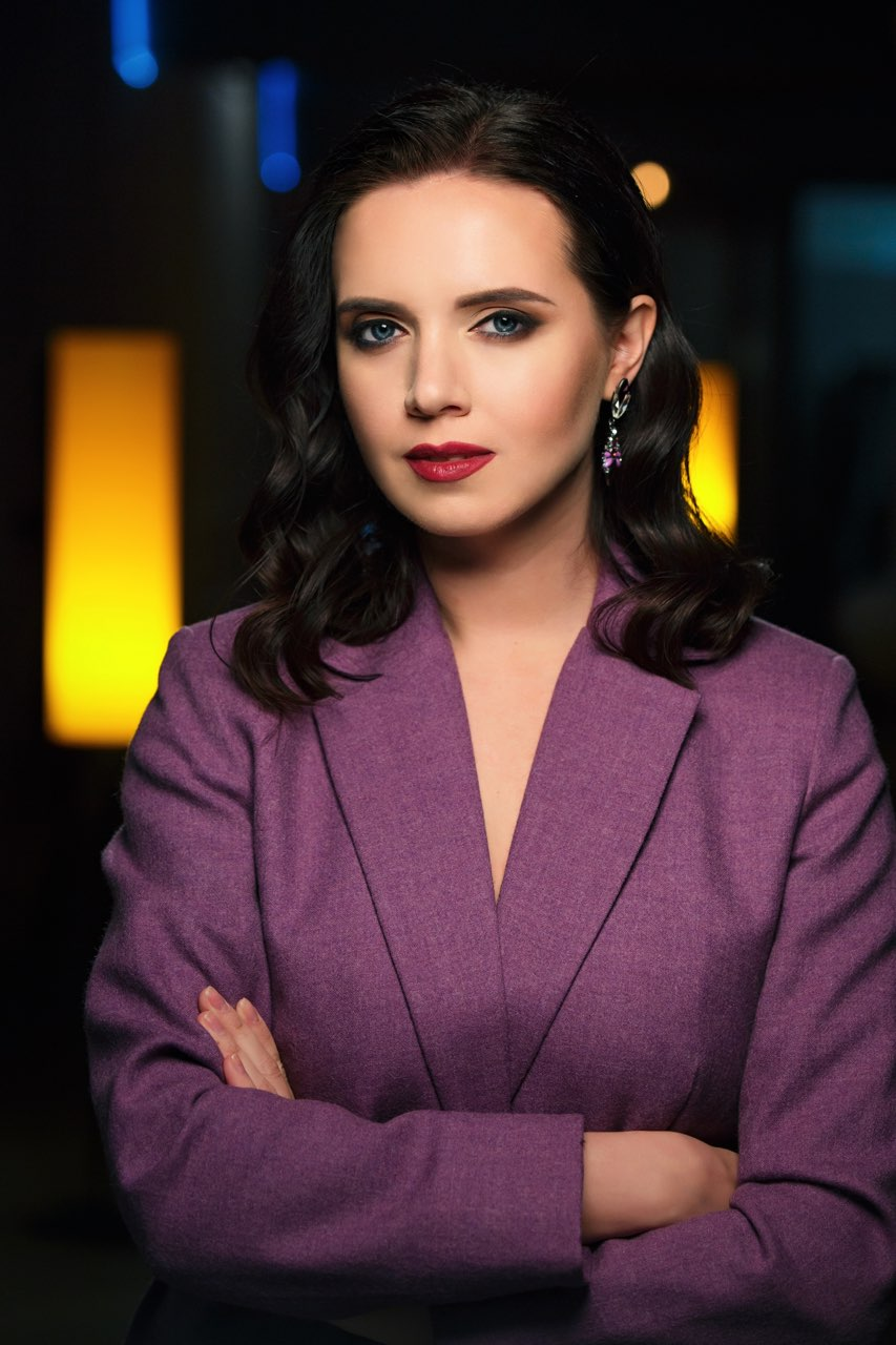 Яніна Соколова - українська телеведуча та актриса.